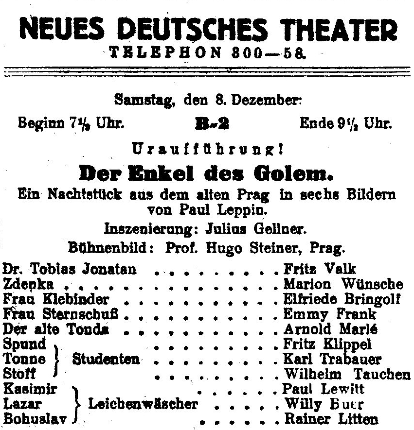 Upozornění na premiéru hry Der Enkel des Golem v Prager Tagblatt ze dne 8. prosince 1934